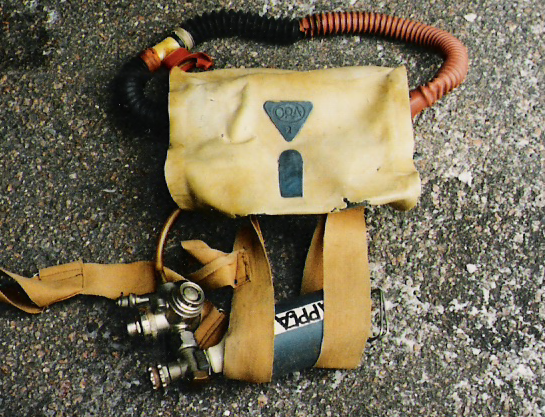 Omatekoinen ORA-hapenkierrätin 1950-luvulta